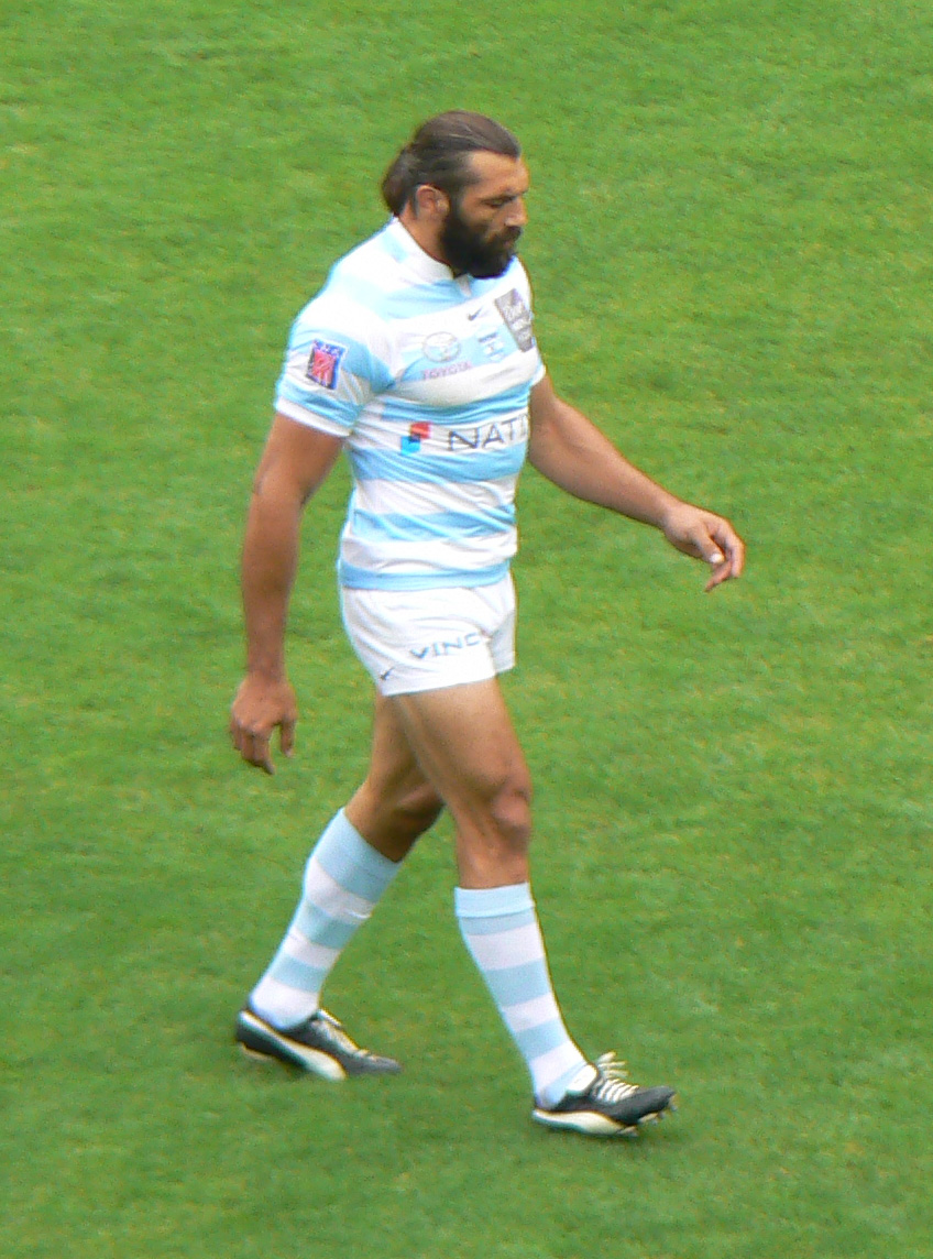 Sébastien Chabal avec le Racing Métro 92 quelques instants avant l'affrontement contre l'ASM Clermont Auvergne au stade Marcel Michelin à Clermont-Ferrand.